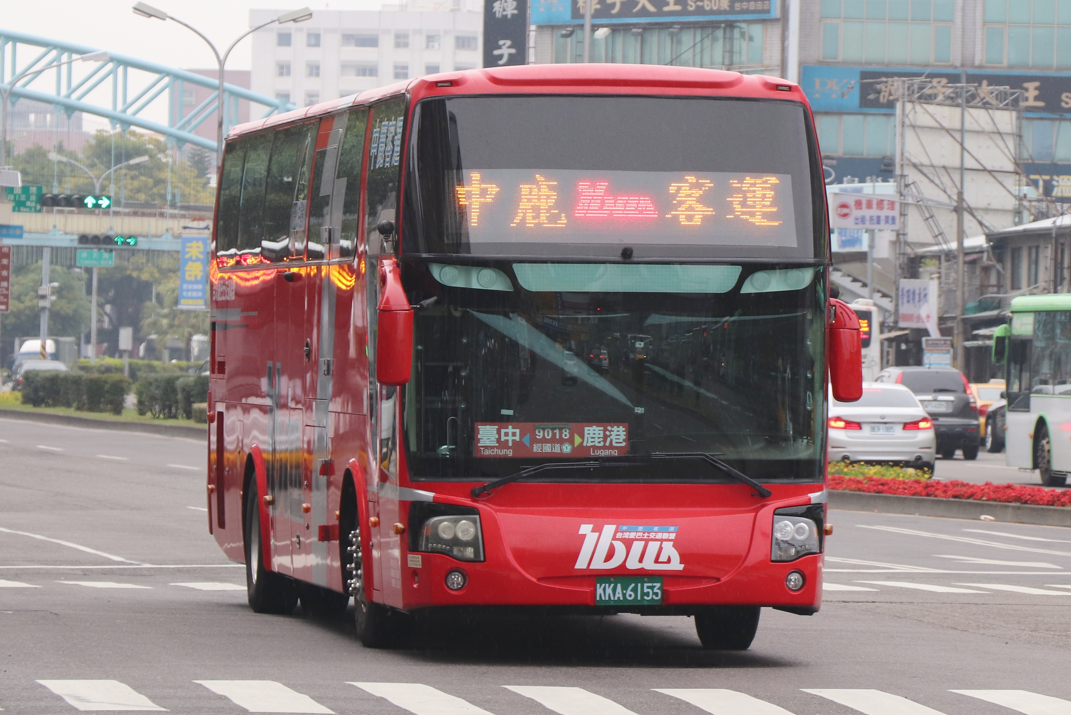 中鹿客運 FUSO RM11FN2XC大客車 KKA-6153